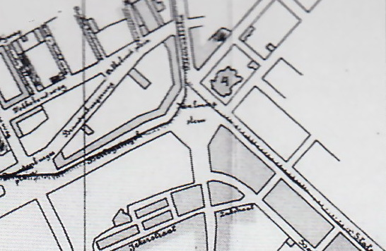 Detail van plattegrond van Maastricht in 1914 met het gebied rondom het Koningin Emmaplein. Collectie Gemeentearchief Maastricht.